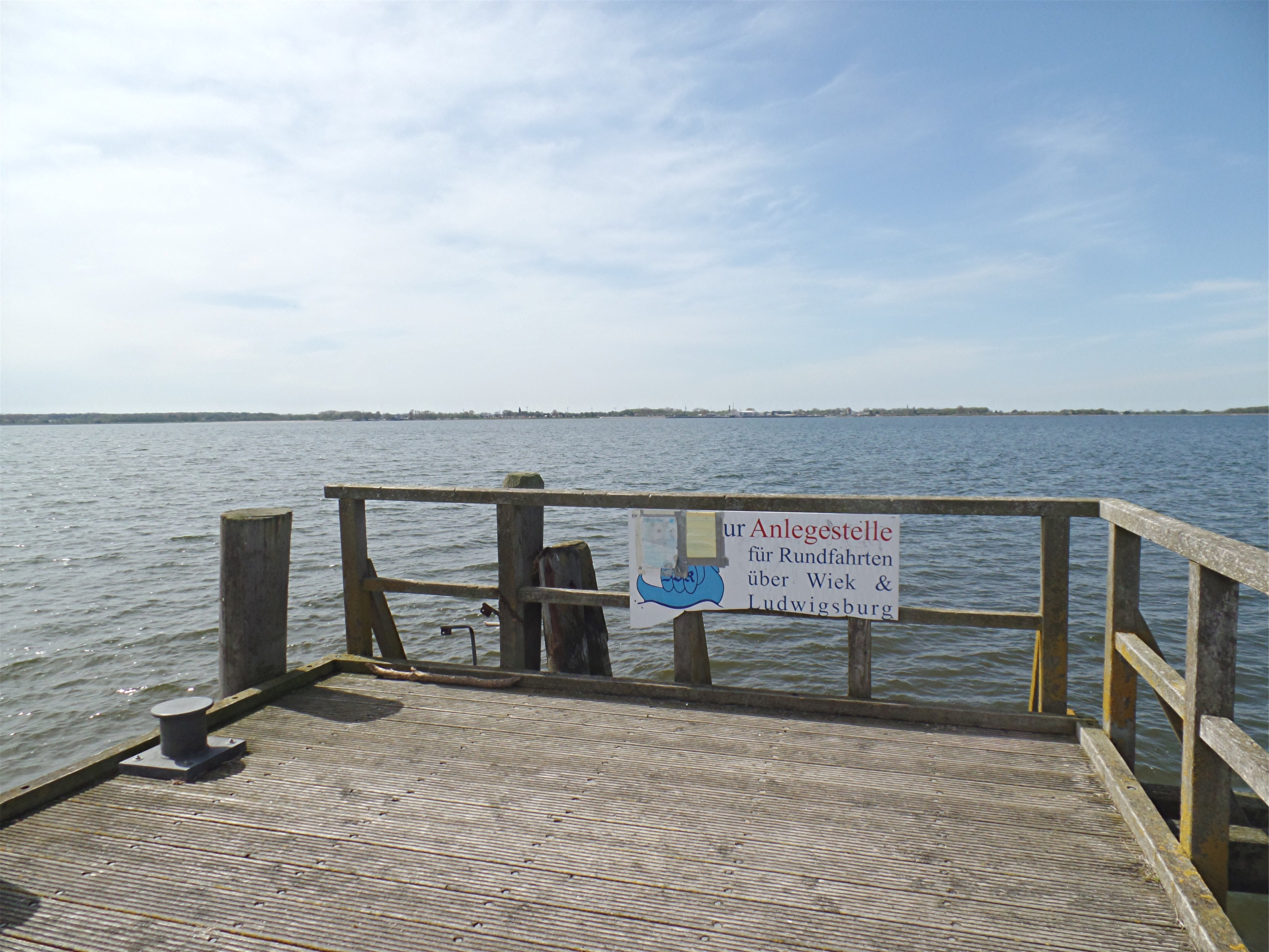 Anlagestelle Ludwigsburg